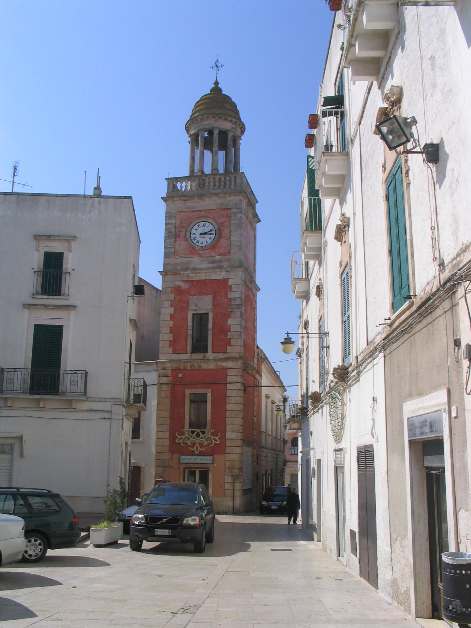 Noci (BA): Torre dell'Orologio in piazza Plebiscito